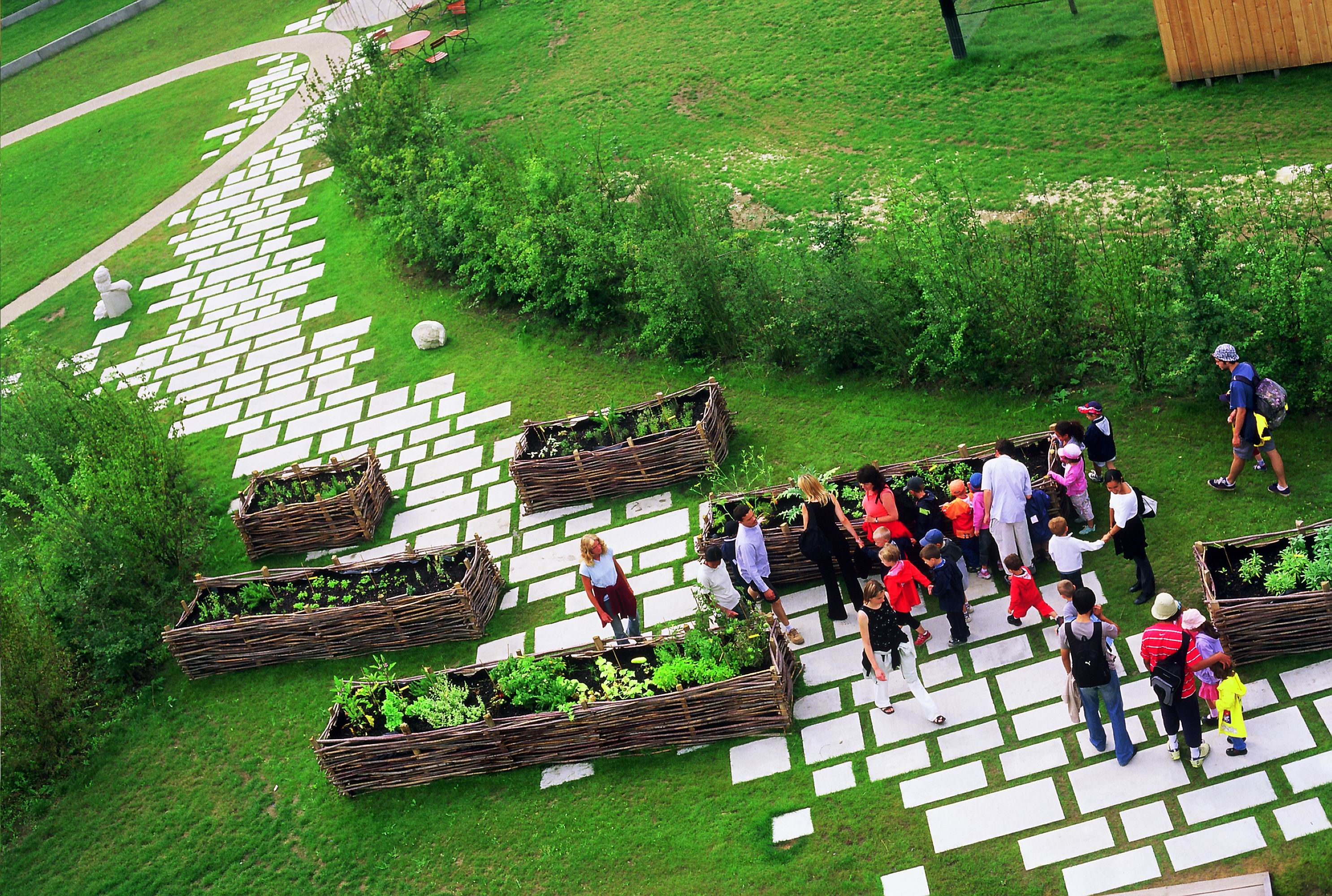 jardin MOSAÏC, les terrasses de la Méditerranée (Houplin Ancoisne, Nord-Pas-de-Calais, France).